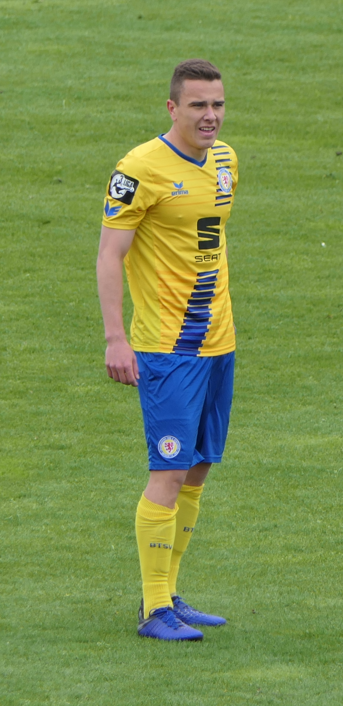 Der Fussballprofi Mike Feigenspan im Trikot von Eintracht Braunschweig beim Auswärtsspiel beim VfR Aalen am 05.05.2019.